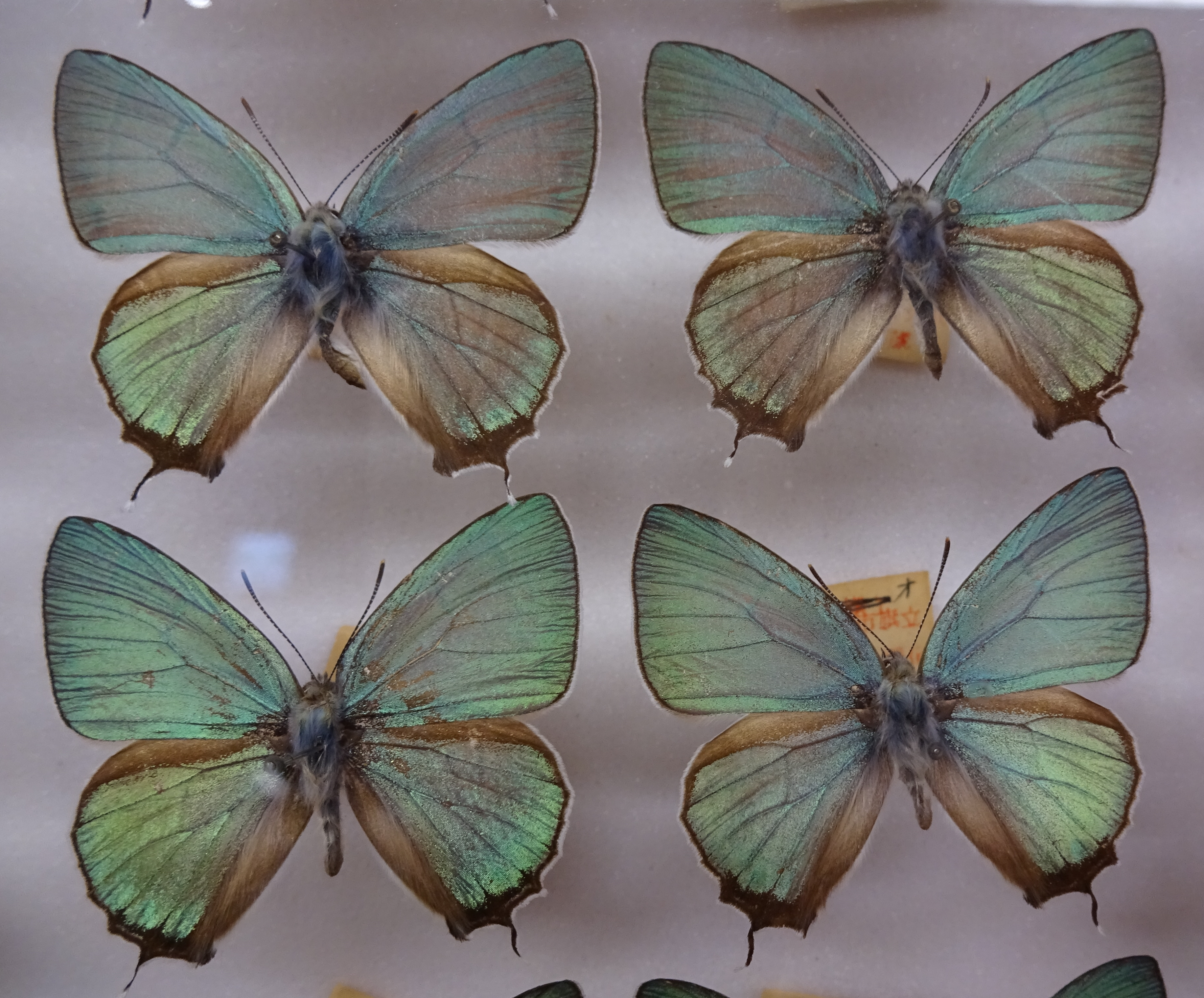 オオミドリシジミ